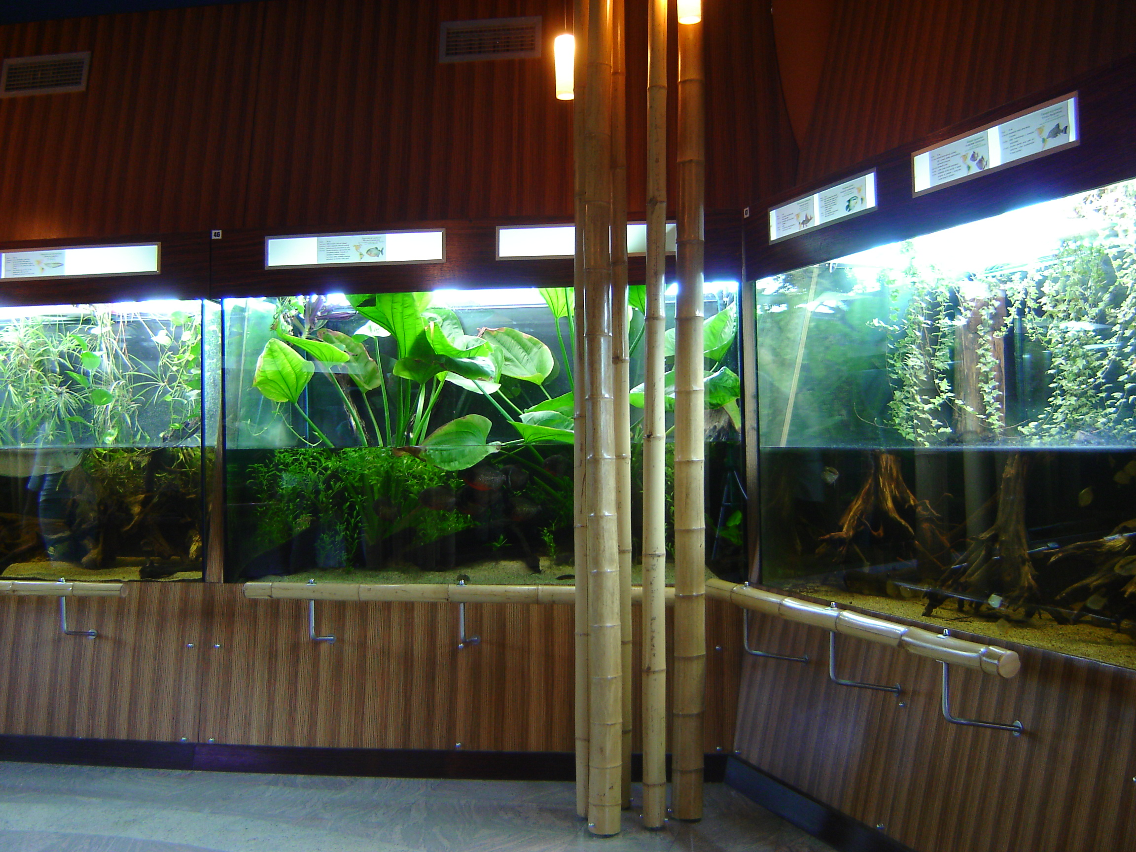 Gdynia Aquarium